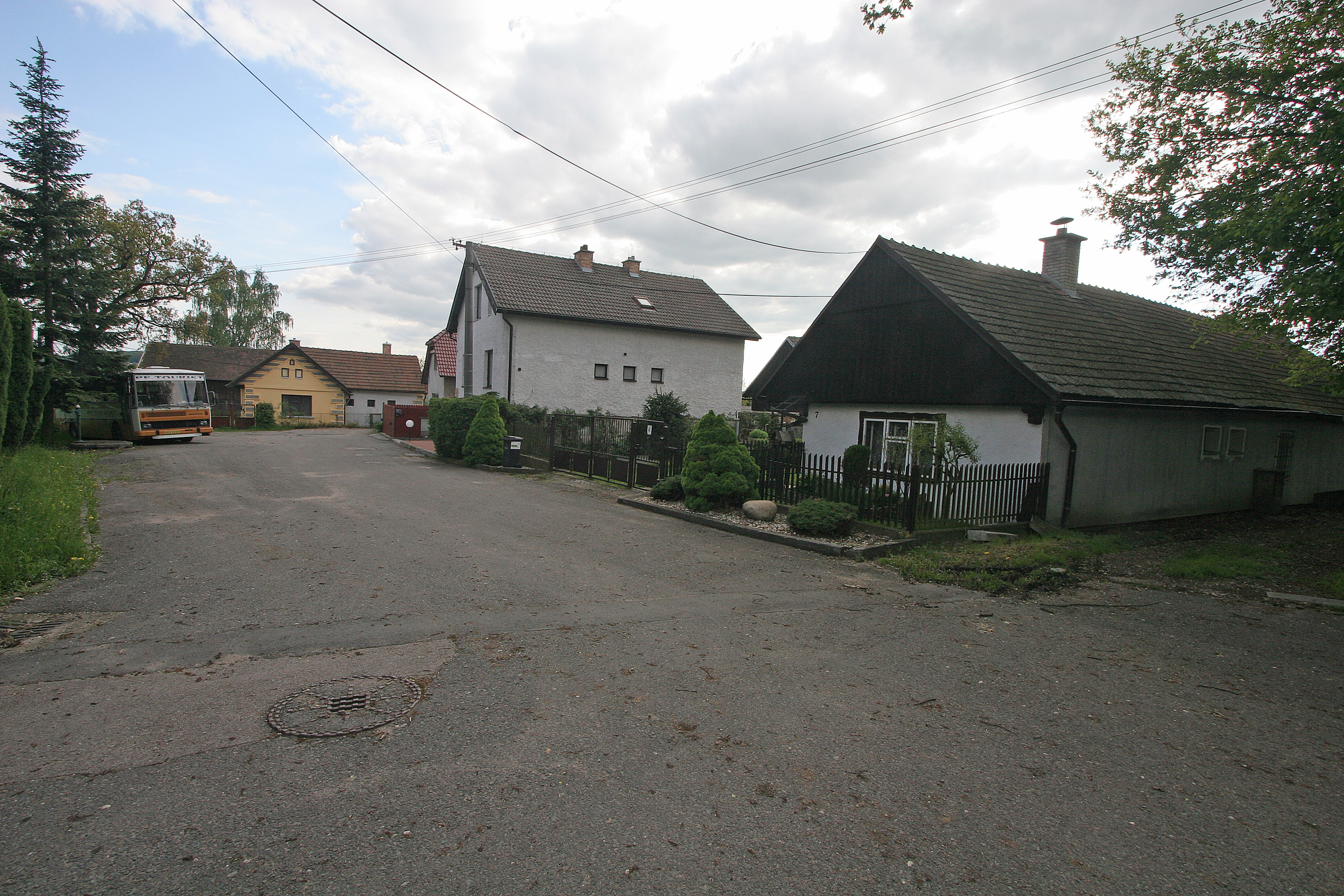 Řehoty čp. 7